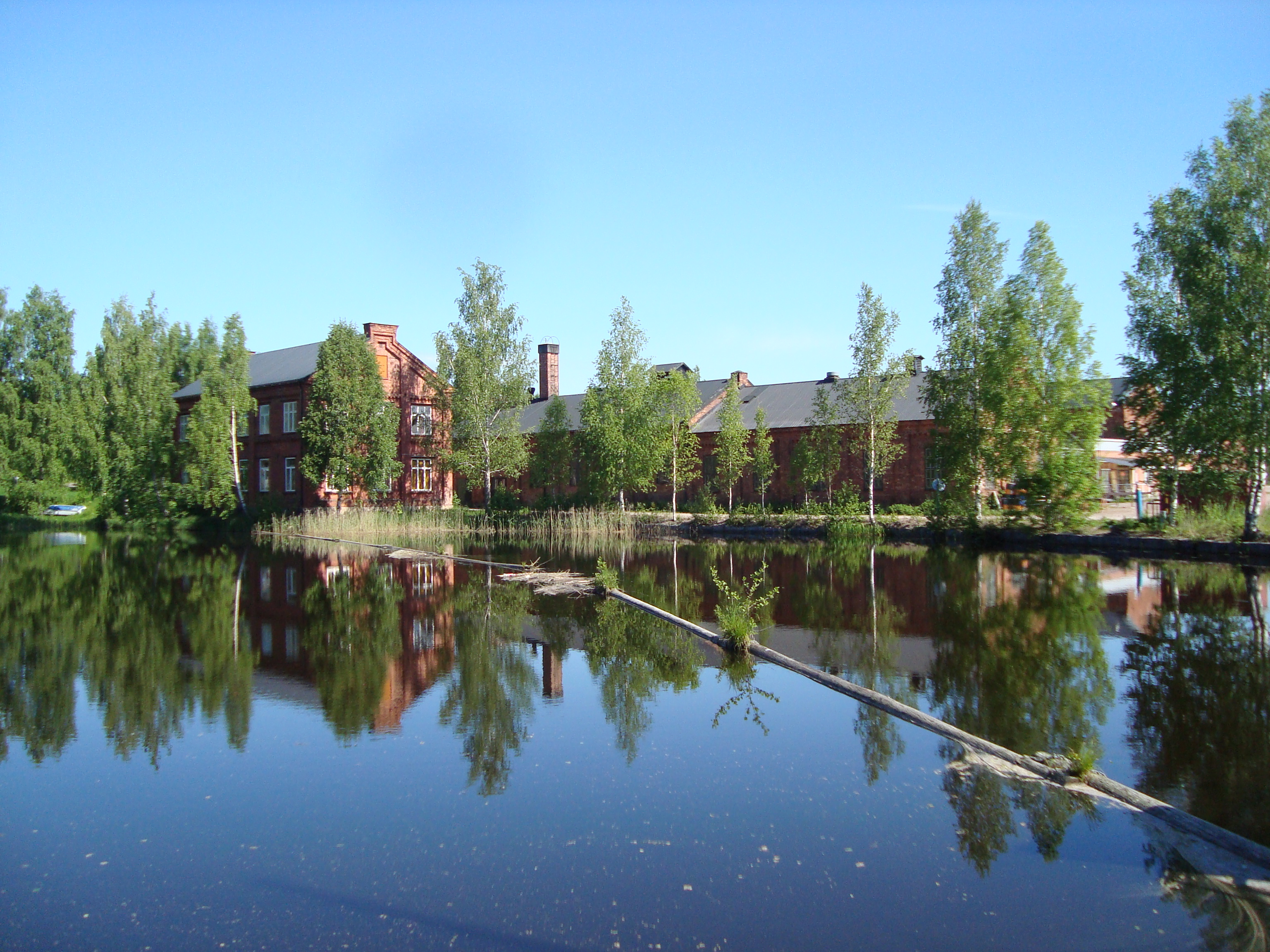 Gästrike-Hammarby, Sandviken Municipality, Sweden